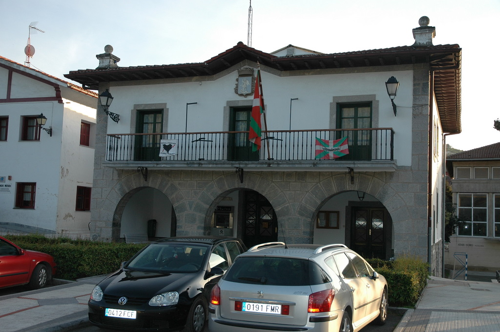 Udaletxea.